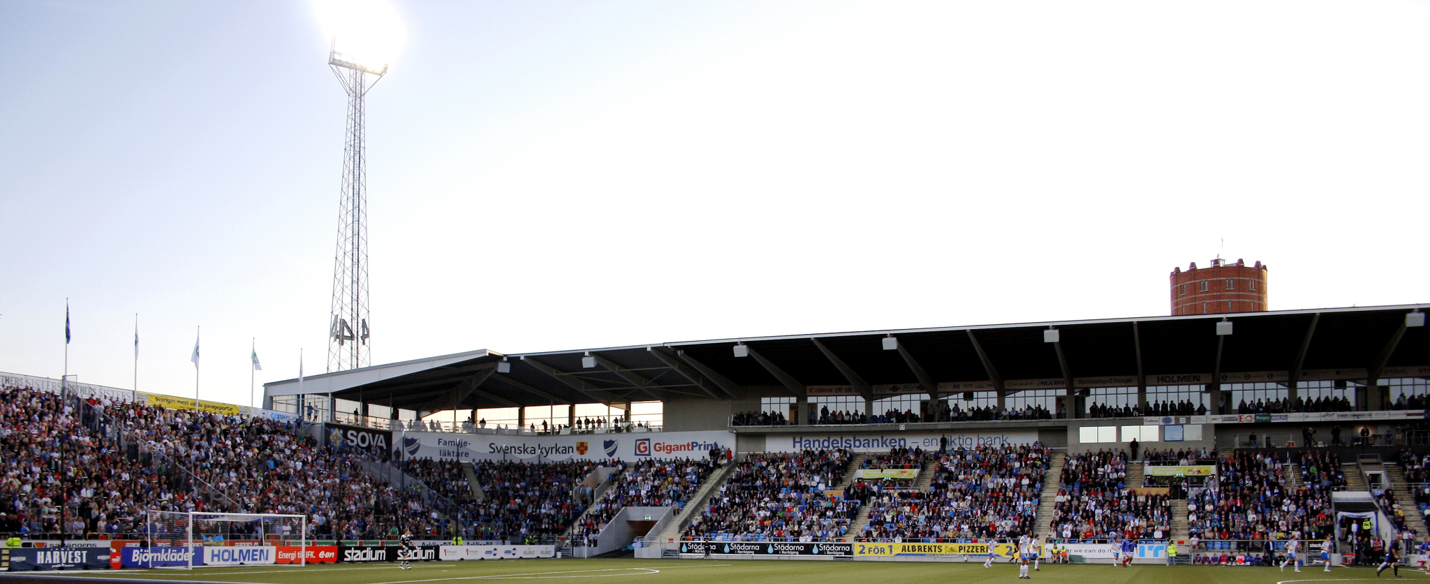 Nya Parken under östgötaderbyt IFK Norrköping-Åtvidabergs FF (2-2) i Fotbollsallsvenskan 2012, publik: 15 715